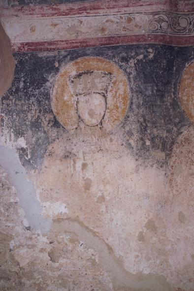 Deze versleten muurschildering kan gewoon niet modern zijn :-)